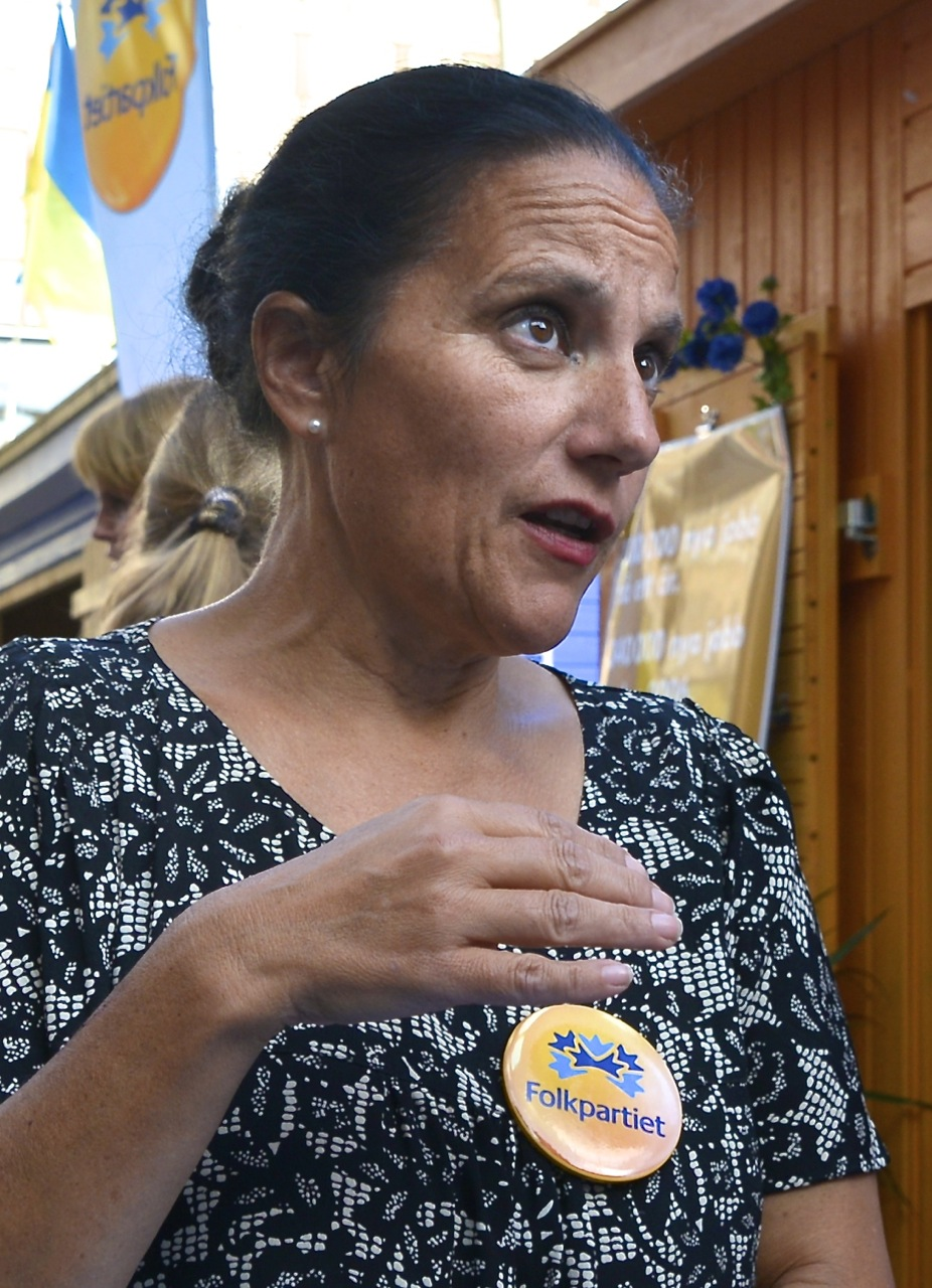 Stella Fare i valrörelsen 2014.